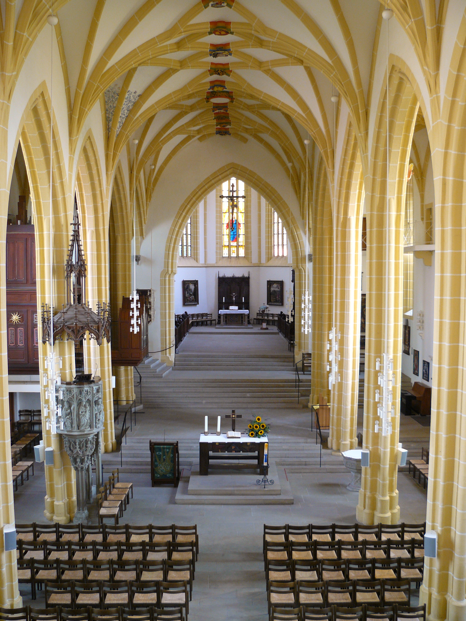 Chorraum der evangelischen Stiftskirche Herrenberg